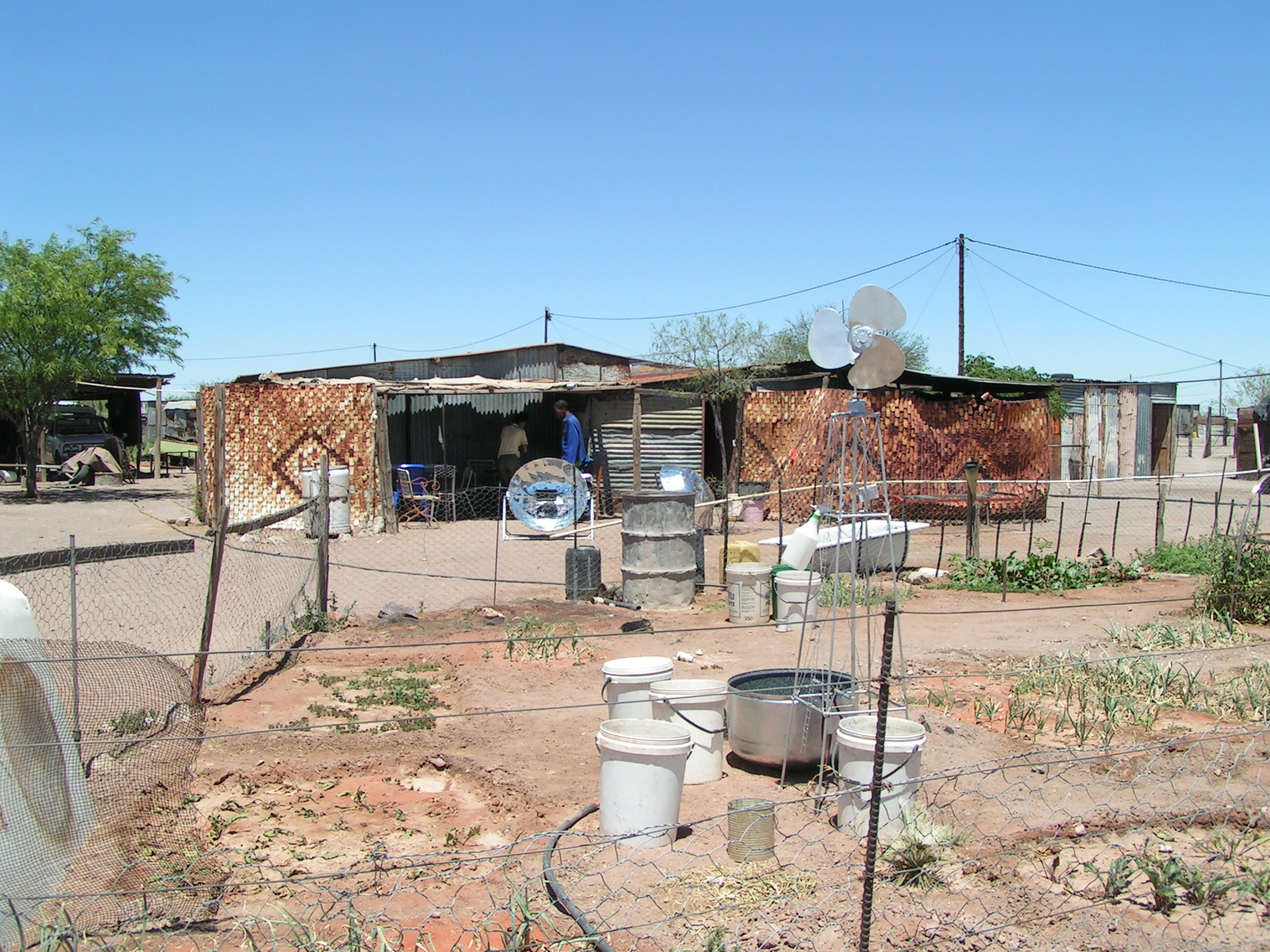 Namibia 029